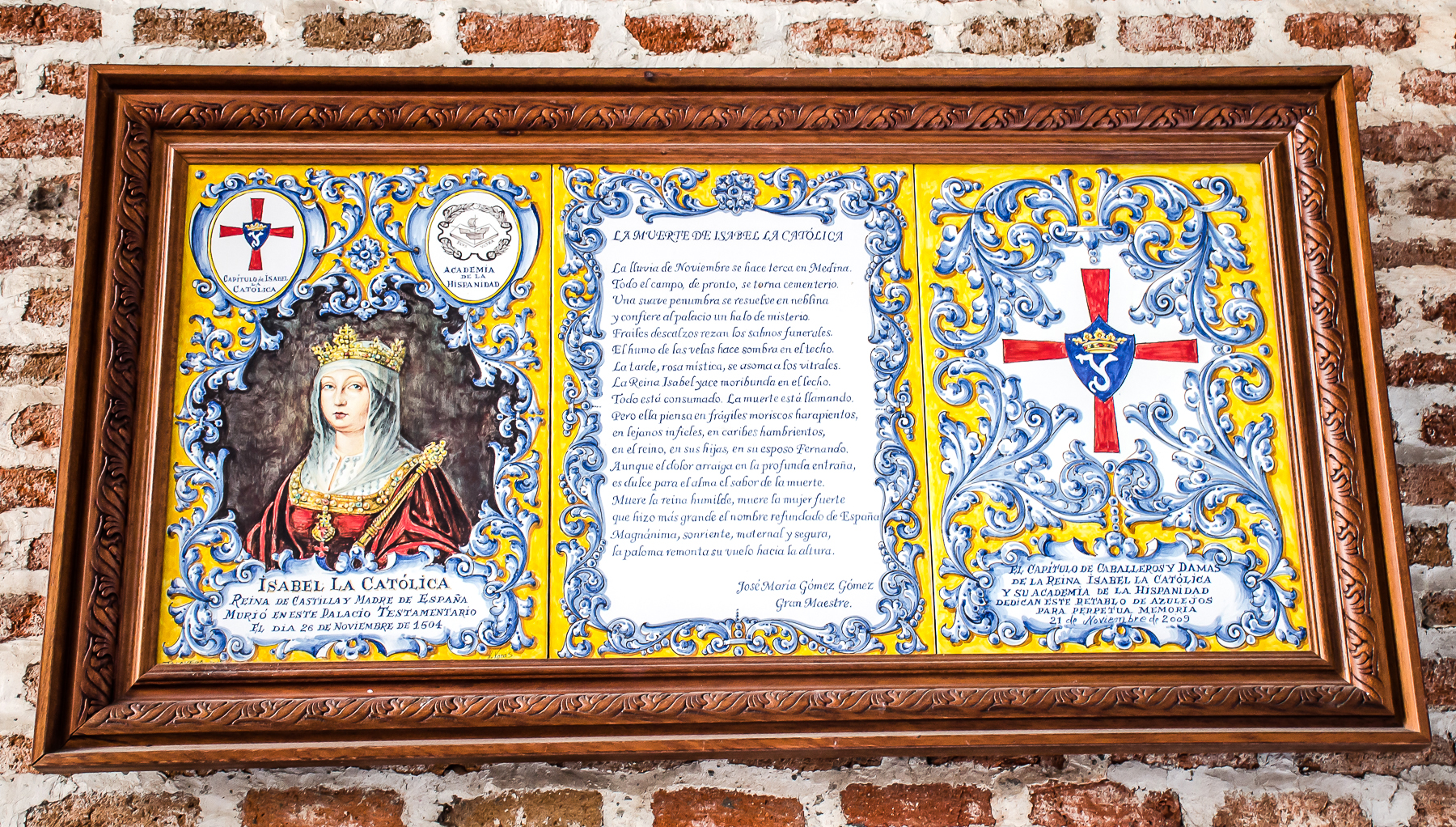 En 2016, el «Capítulo de Nobles Caballeros y Damas de Isabel La Católica» rindió homenaje a Isabel la Católica en el 512 aniversario de su muerte, con esta baldosa conmemorativa puesta en su casa testamentaria. Incluye una poesía de José María Gómez Gómez.